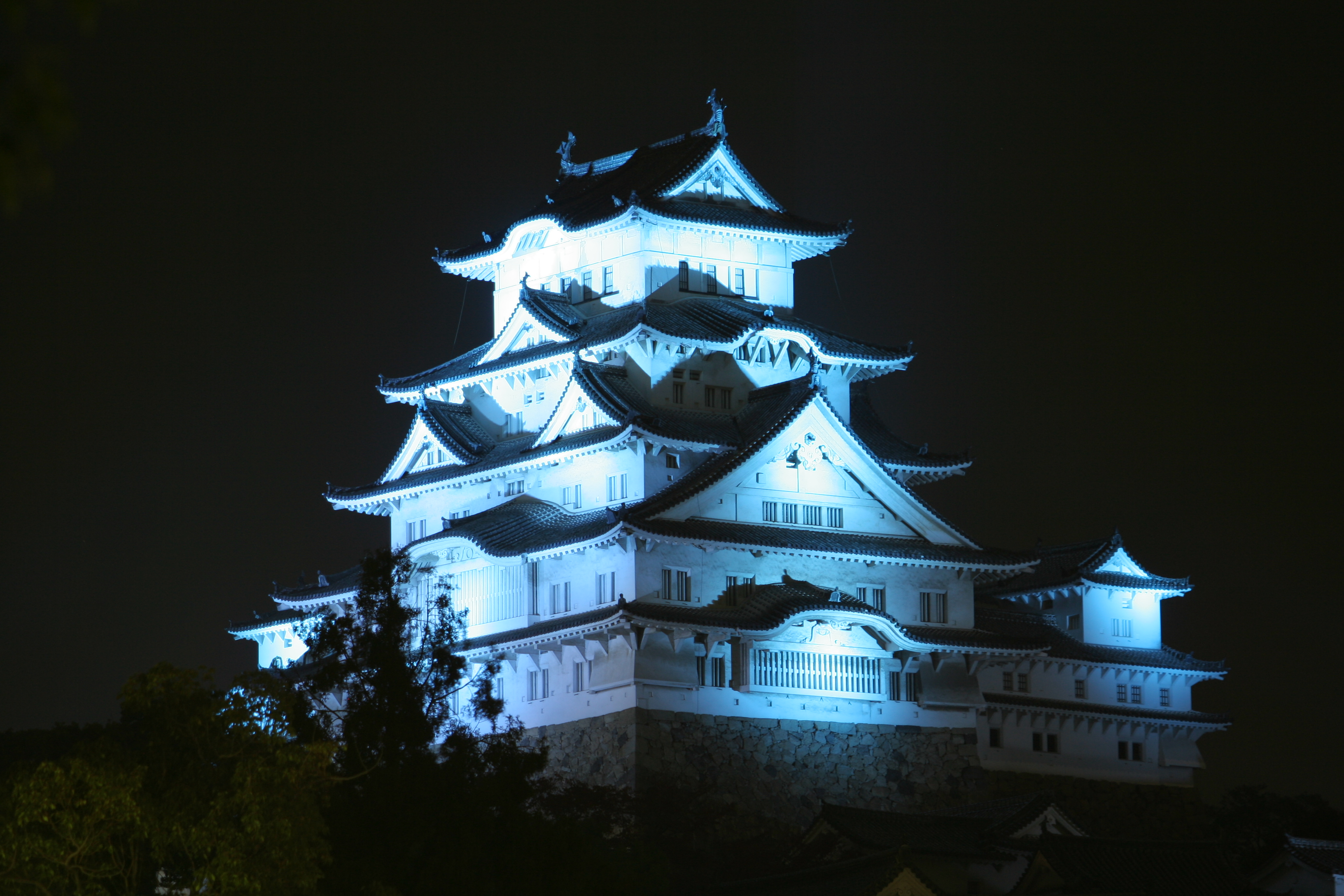 2008年11月14日の夜、「世界糖尿病デー」のテーマカラーのブルーにライトアップされた姫路城。東南東から撮影。